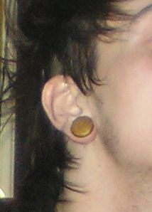 Earplug